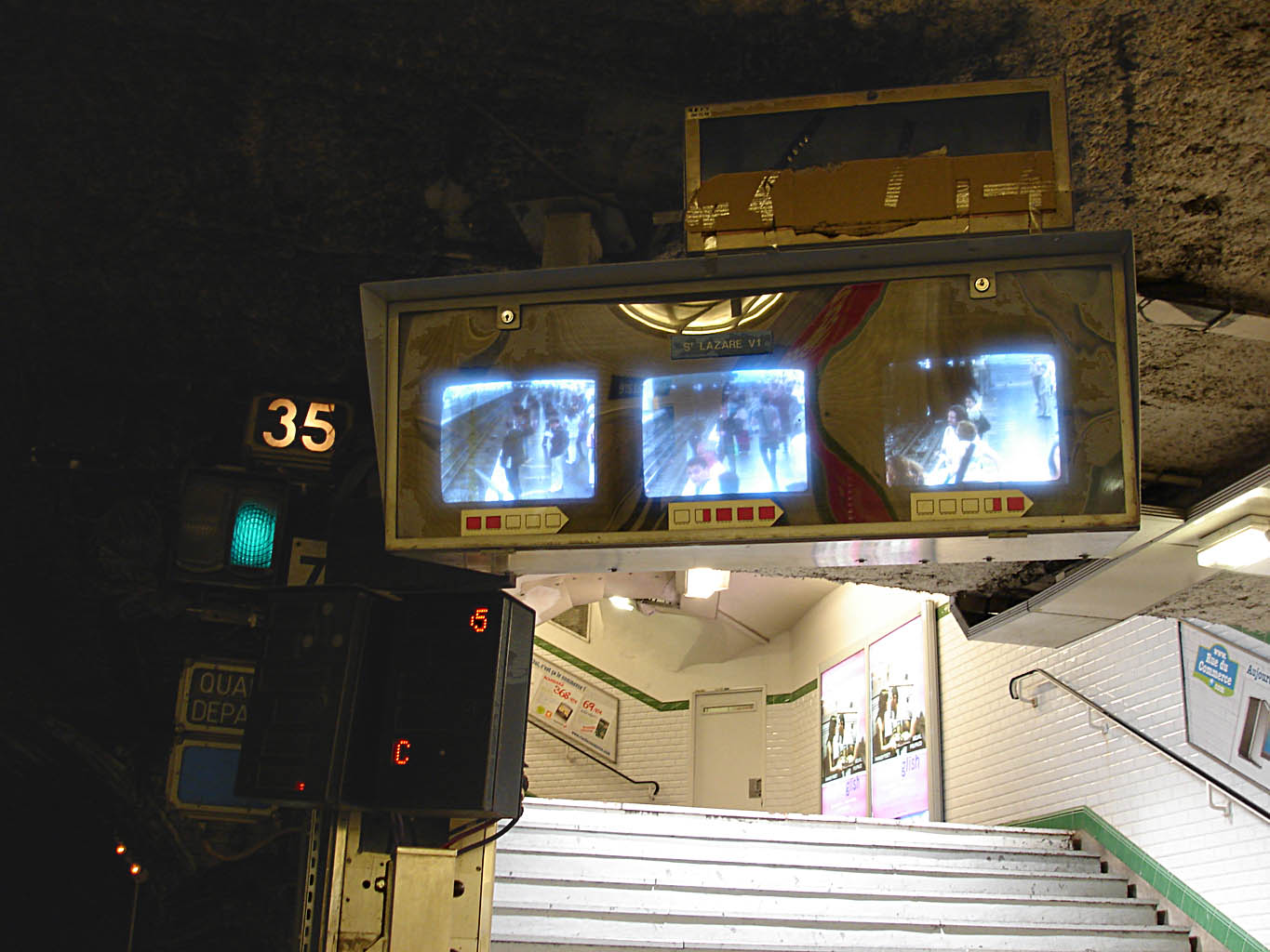 Station Saint-Lazare, de la ligne 13 du métro de Paris, France.